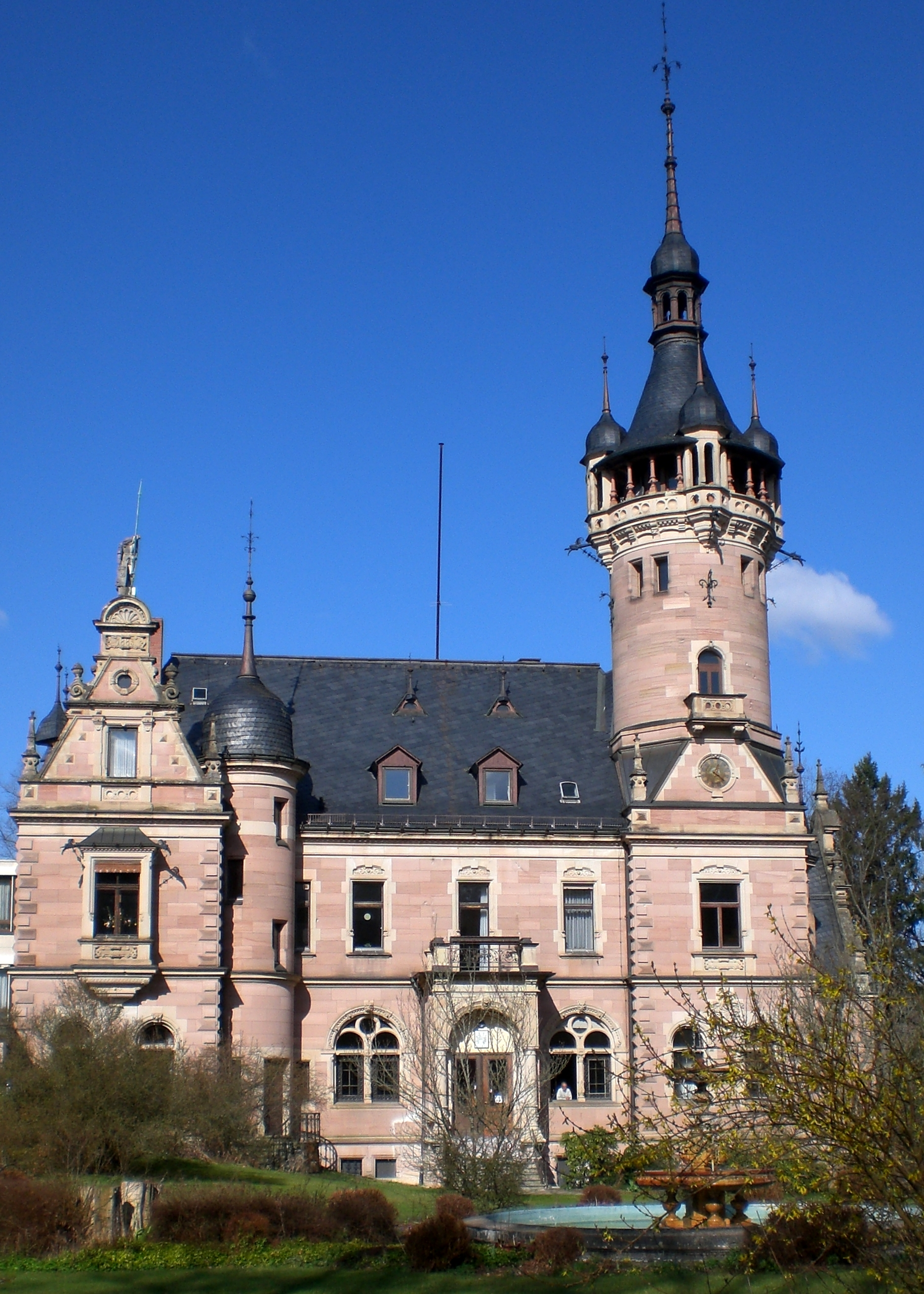 Faberschloss in Schwarzenbruck